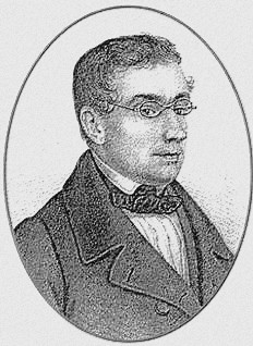 Robert Führer (1807 - 1861), Český varhaník a hudební skladatel.